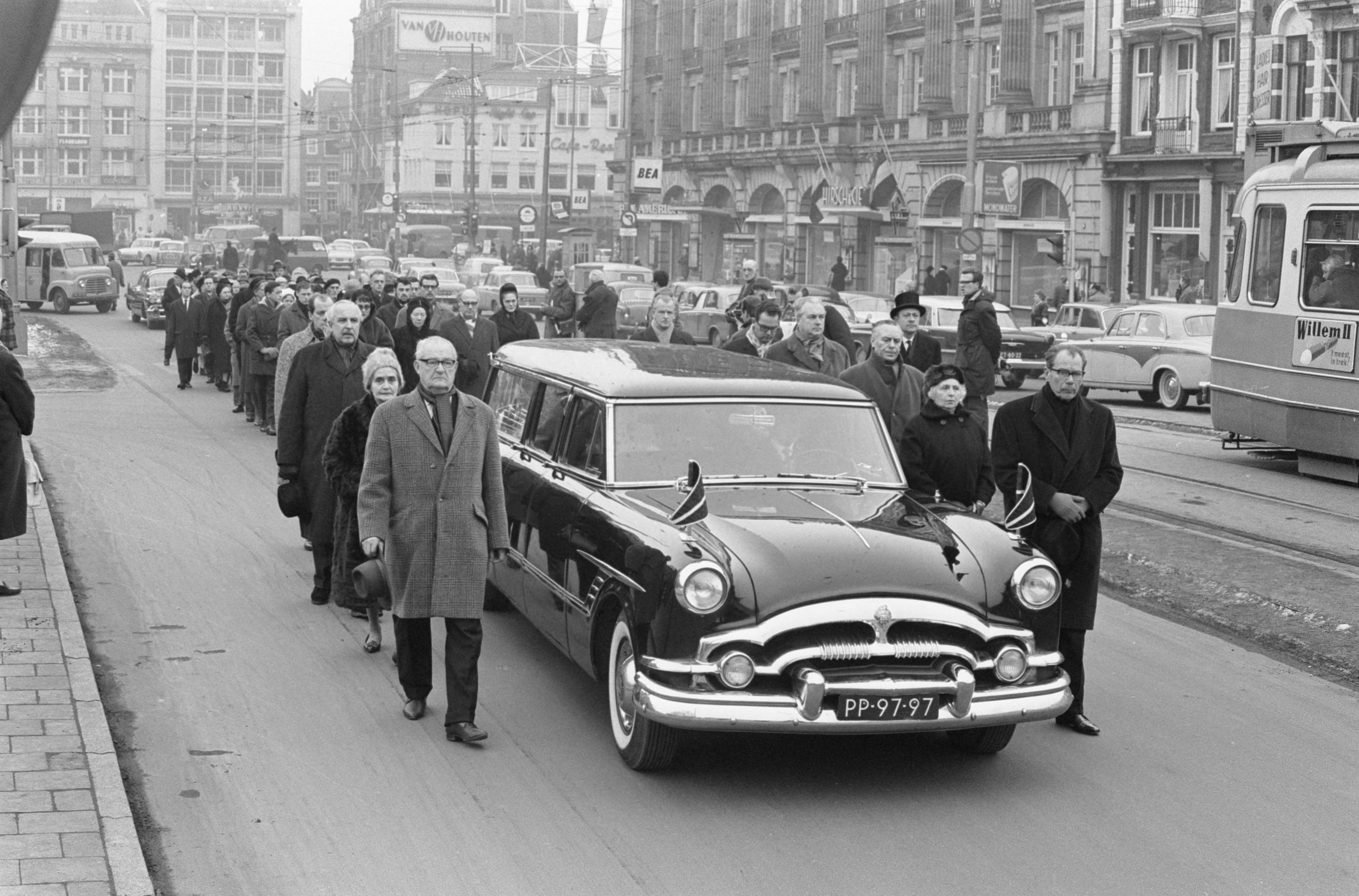 Collectie / Archief : Fotocollectie Anefo Reportage / Serie : [ onbekend ] Beschrijving : Herman Bouber vanuit Stadsschouwburg naar laatste rustplaats verrokken, slippen dragers, Jan Lemaire , Nel Knoop , Hans Tienmeier , S. Poons $ Datum : 7 februari 1963 Persoonsnaam : Bouber Herman, Jan Lemaire, Poons, S. Fotograaf : Gelderen, Hugo van / Anefo Auteursrechthebbende : Nationaal Archief Materiaalsoort : Negatief (zwart/wit) Nummer archiefinventaris : bekijk toegang 2.24.01.05 Bestanddeelnummer : 914-7977